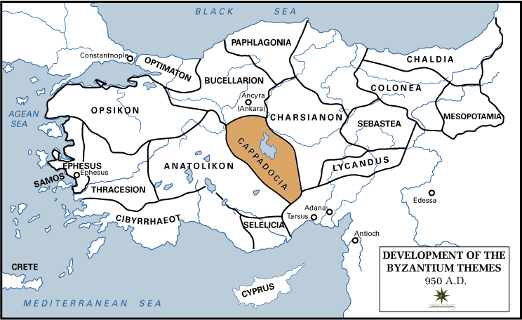 Kappdokien als Thema im Byzantinischen Reich